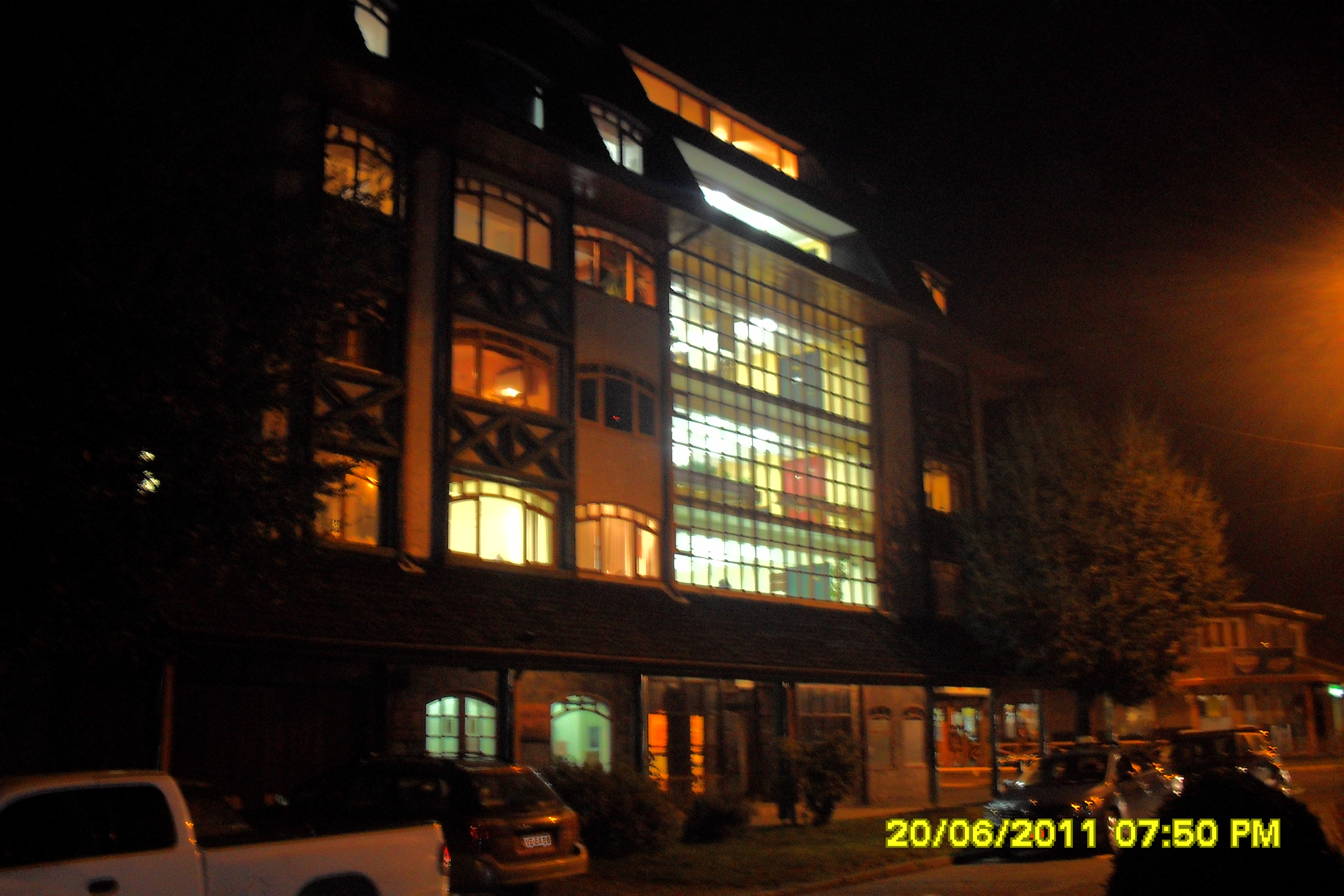 Edificio el Pehuen